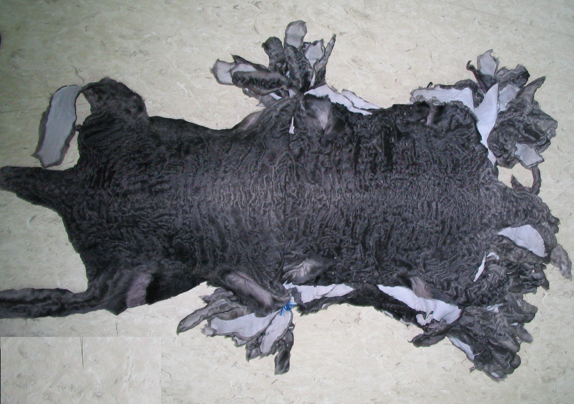 Bund „wayo“ gefärbte Afghanische Karakul Persianerfelle